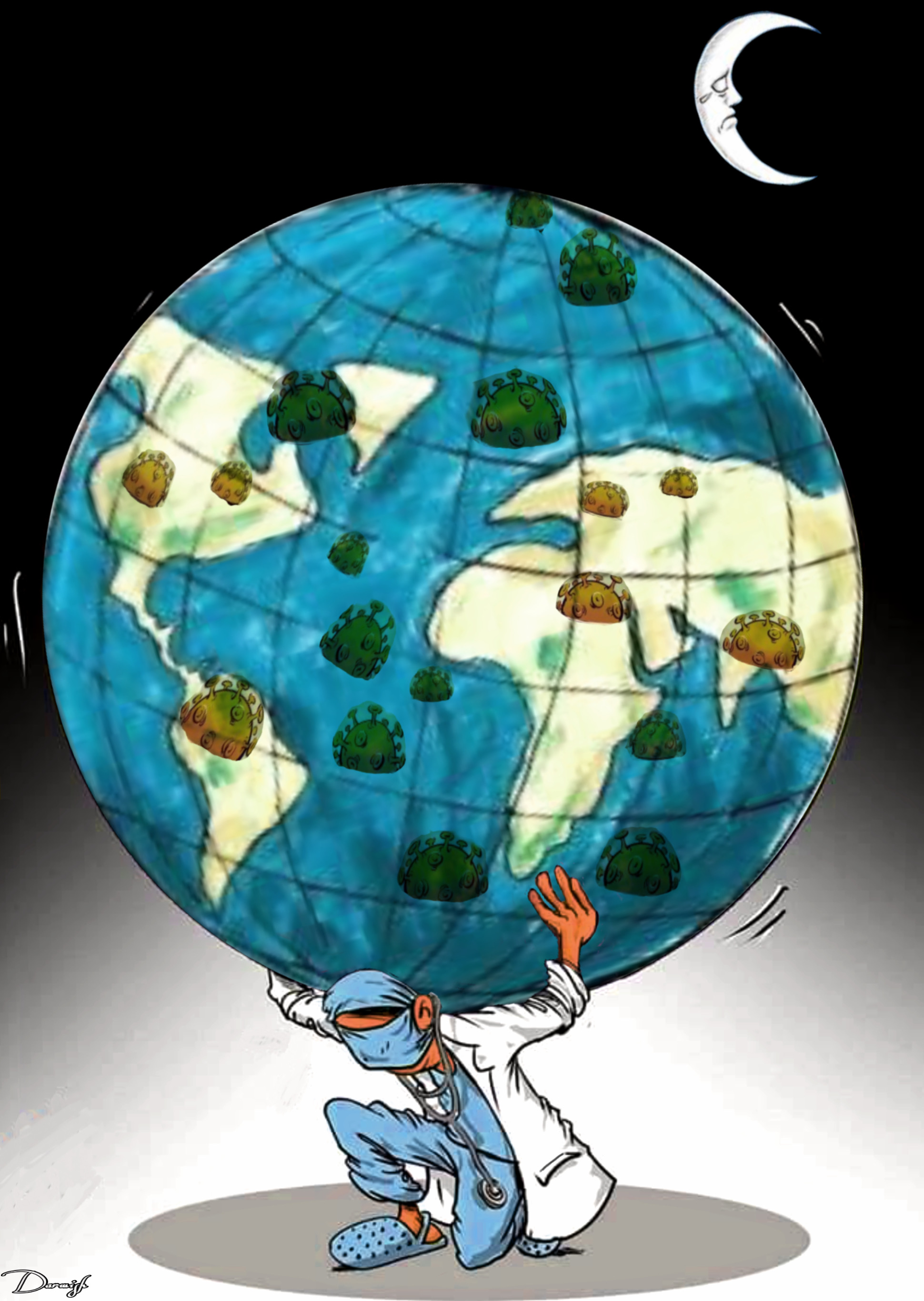 كورونا